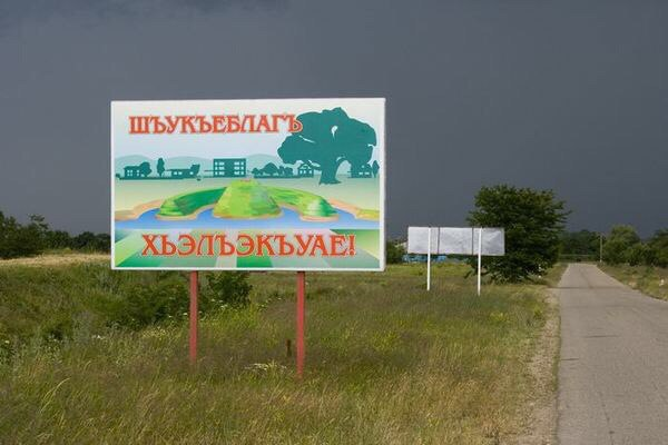 Адыгэбзэ: Хьэлъэкъуае дэлъадапI